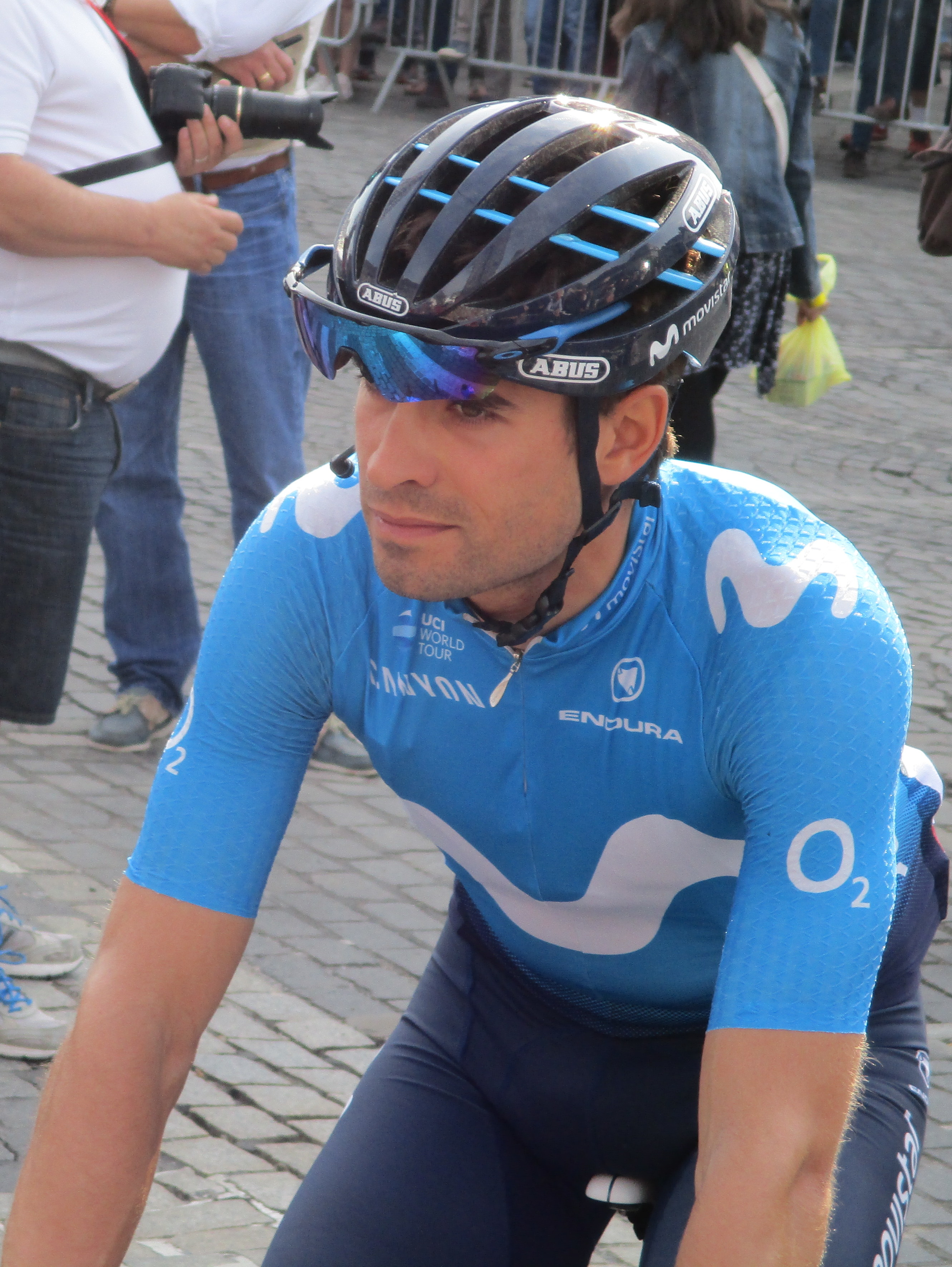 Start van Luik-Bastenaken-Luik 2018 in Luik.